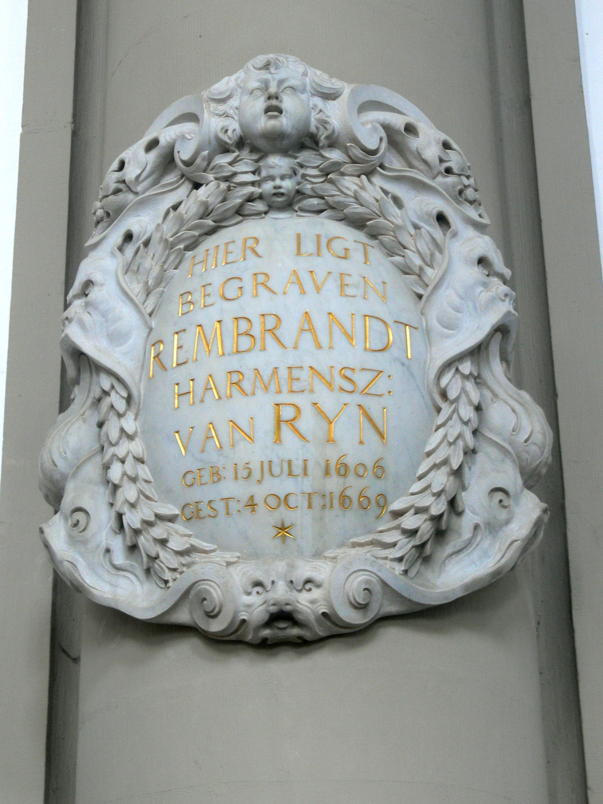 Westerkerk in Amsterdam. Rembrandt-Epitaph.